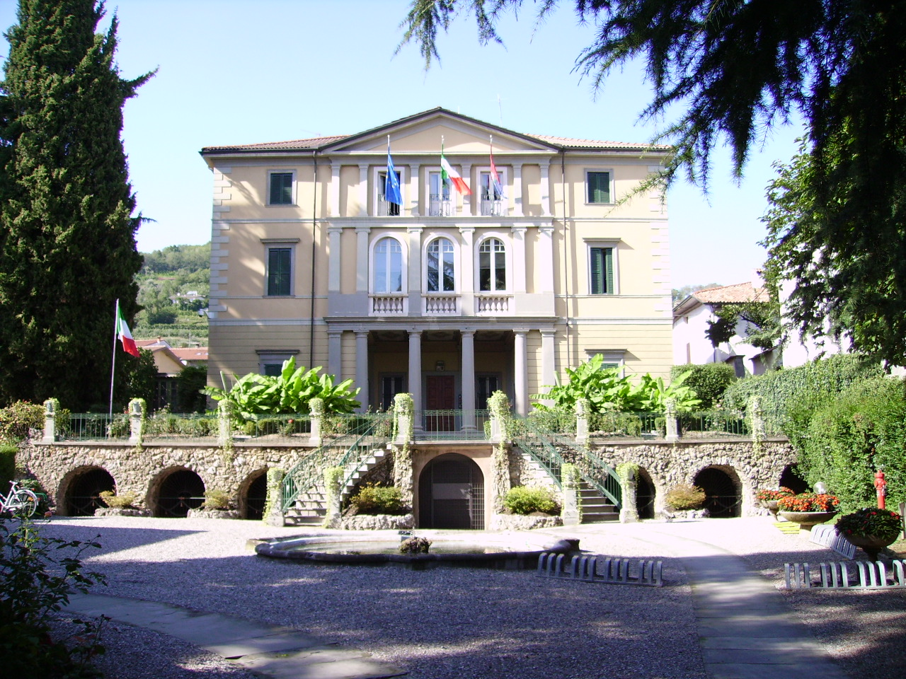 Villa Marini, Castelli calepio, Bergamo, Italia